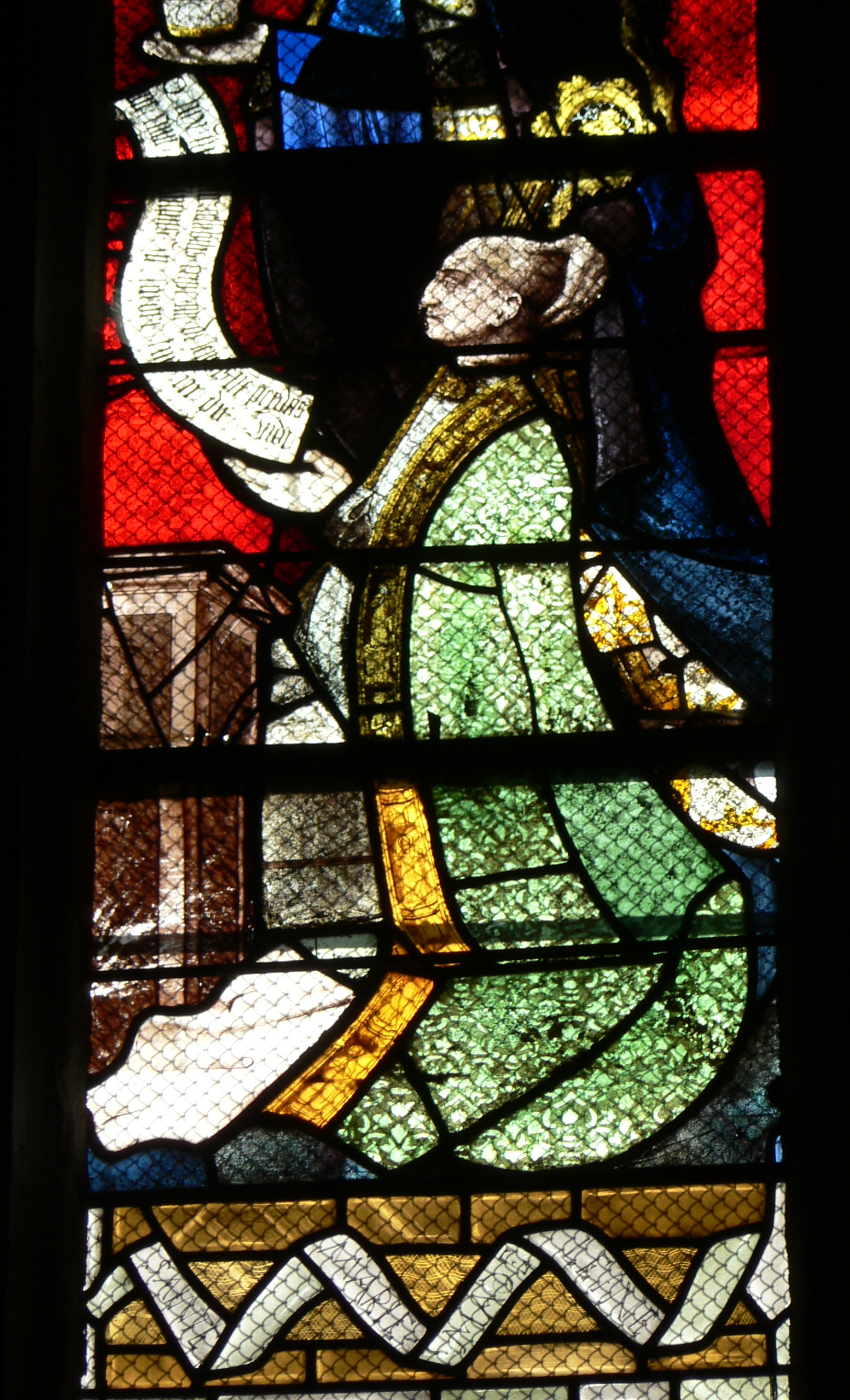 Raymond de Marcenat, abbé de Mozac, représenté sur un vitrail du chœur (XVe siècle) de l'abbatiale Saint-Pierre de Mozac.